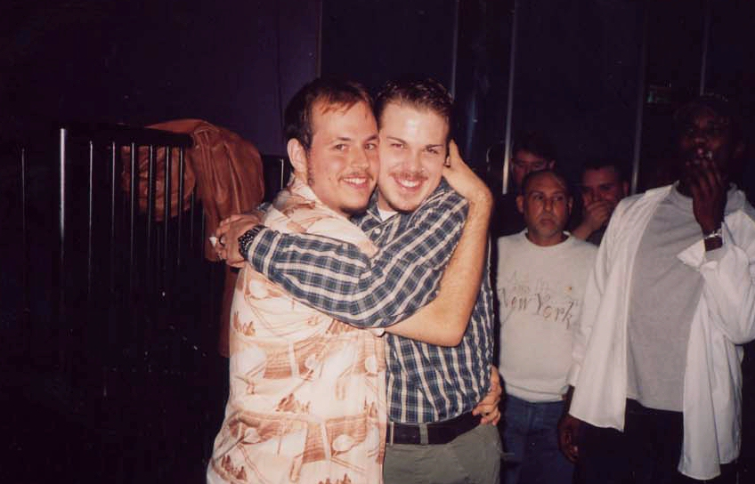 Two men hugging.